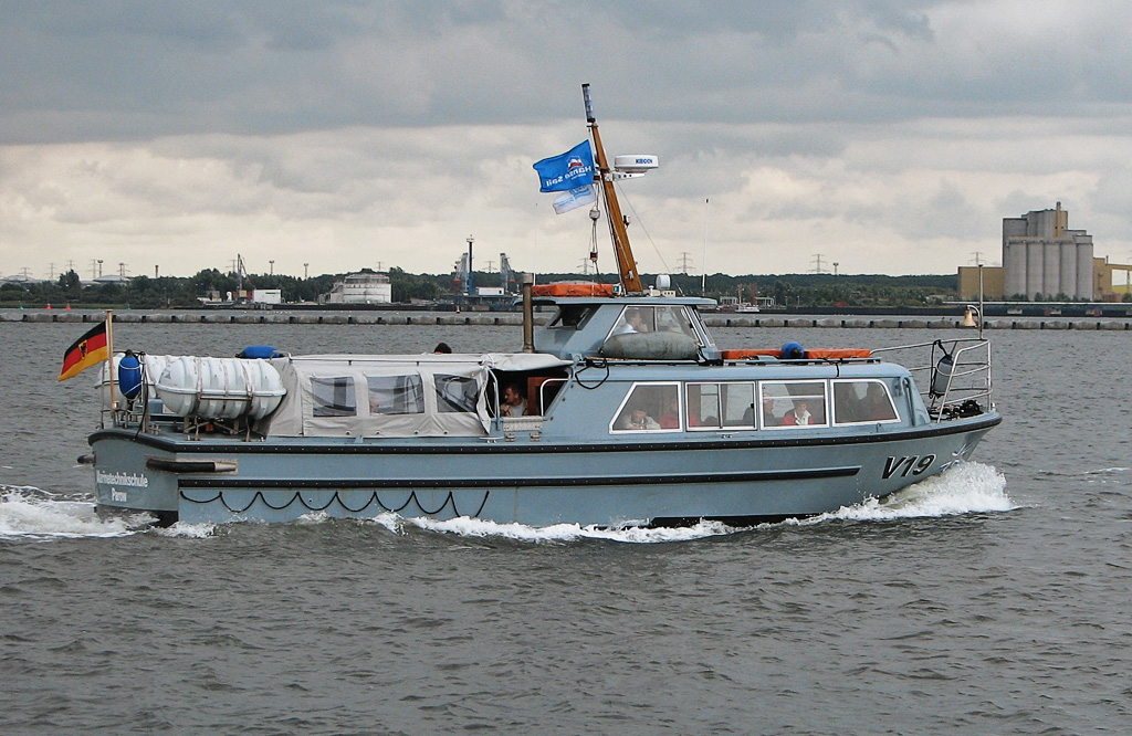 Barkasse der Bundeswehr im Shuttlebetrieb zwischen Hohe Düne und Warnemünde